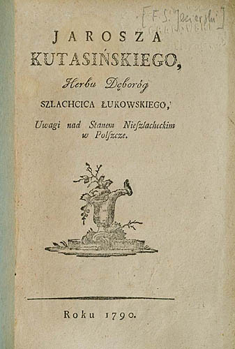 Jarosza Kutasińskiego, Herbu Dęboróg Szlachcica Łukowskiego, Uwagi nad Stanem Nieszlacheckim w Polszeze.